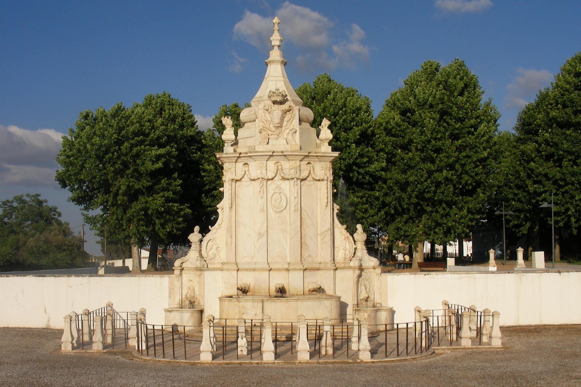 Fotografia da Fonte das Bicas, localizada na Freguesia de Matriz, em Borba (Portugal)